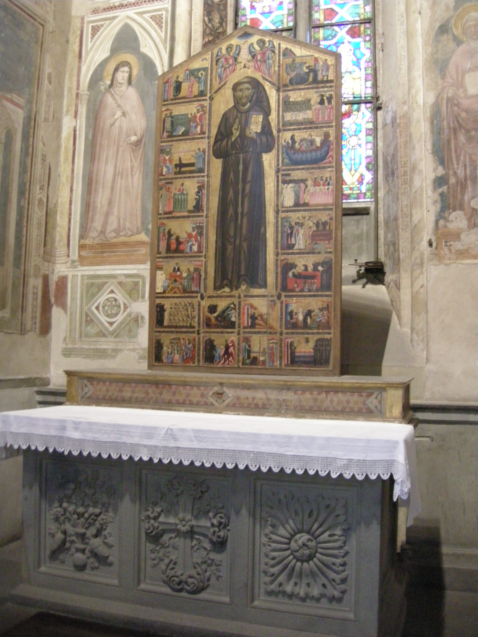 Cappella bardi 14